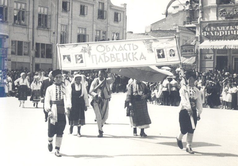 4-ти селскостопански културен и национален събор, 28 - 29 август 1938 г., гр. Варна. Парад на участниците в събора по ул. Княз Борис І. На преден план са представителите на Плевенска област.